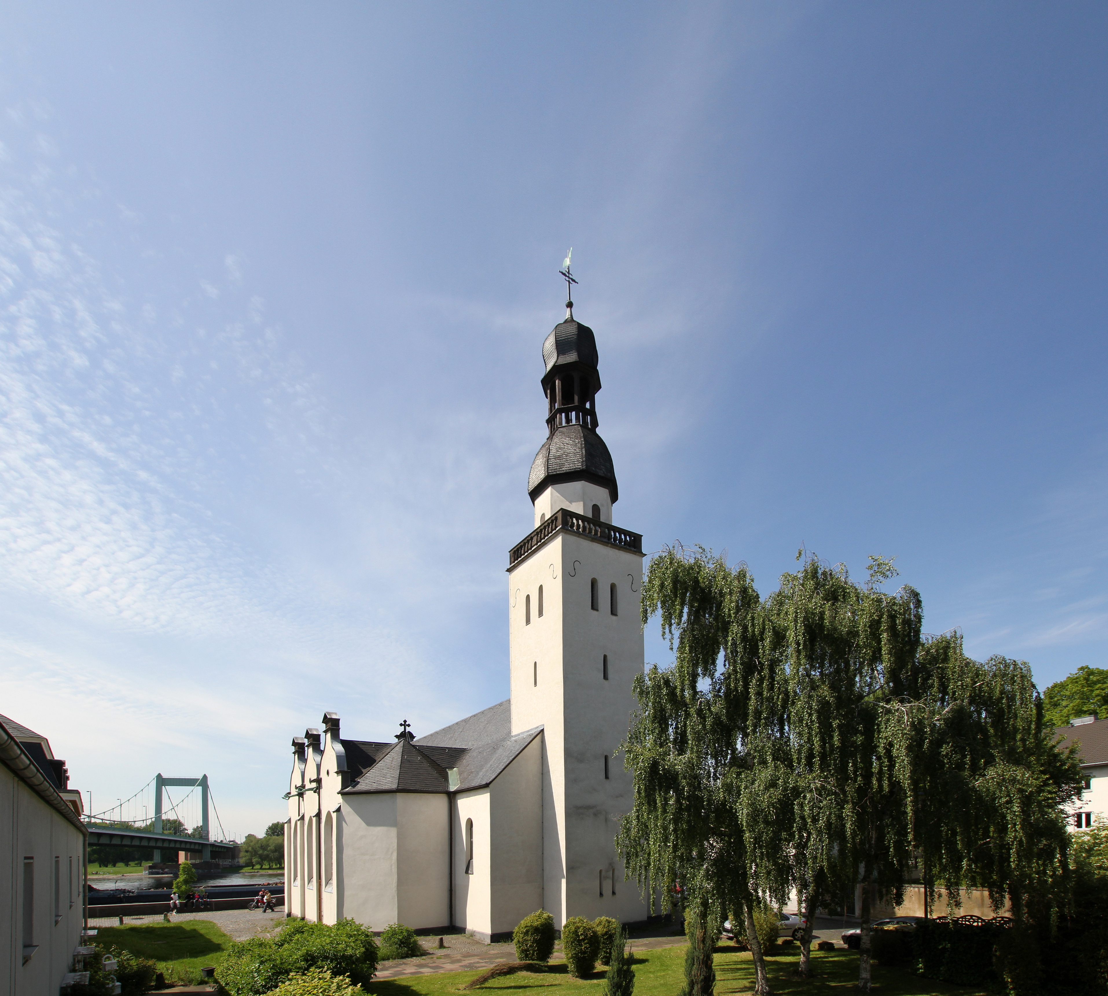 Köln-Mülheim, Sankt Clemens